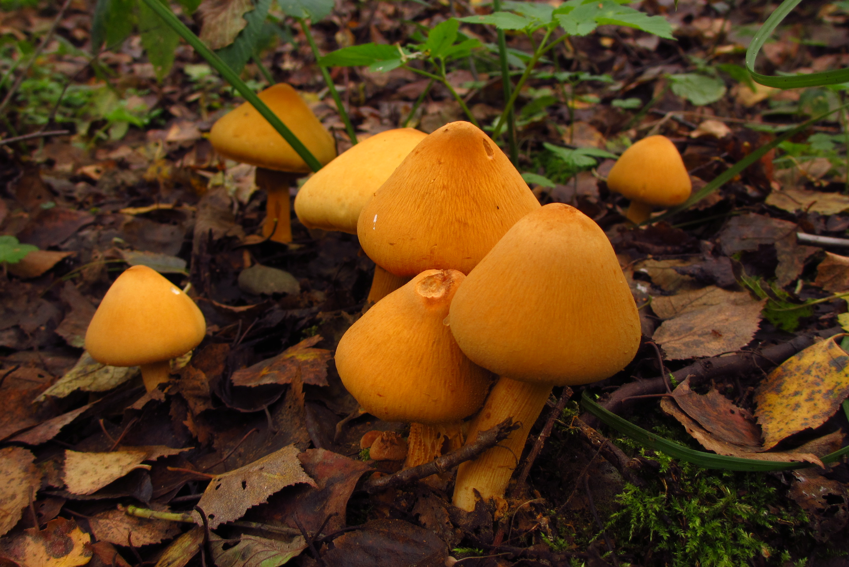 Kuldmamplid Jaanika metsas Harjumaal